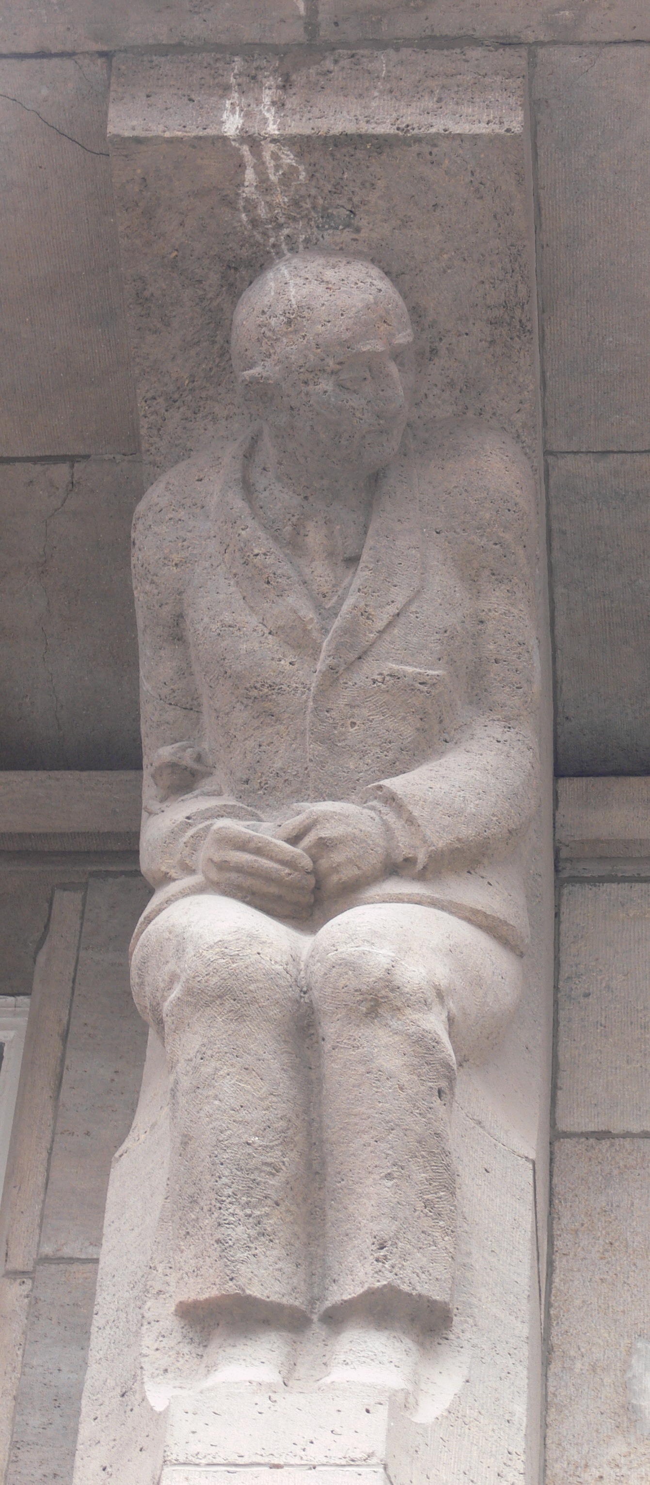 Erfurt, Sparkasse am Fischmarkt (1934/1935) Reliefgestaltung zum Thema "Die Laster und die Tugenden" von Hans Walther Das Laster Neid